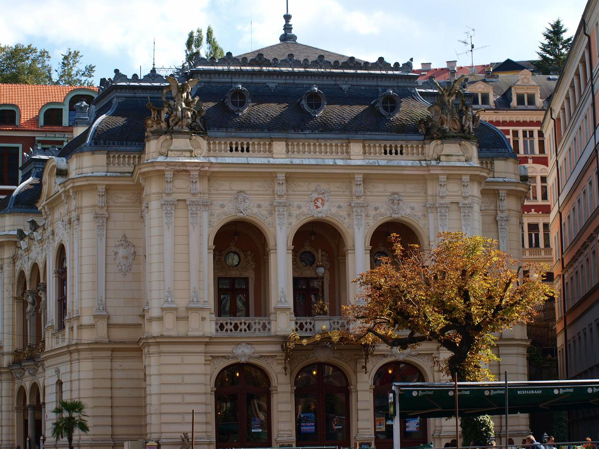 Městské divadlo Karlovy Vary